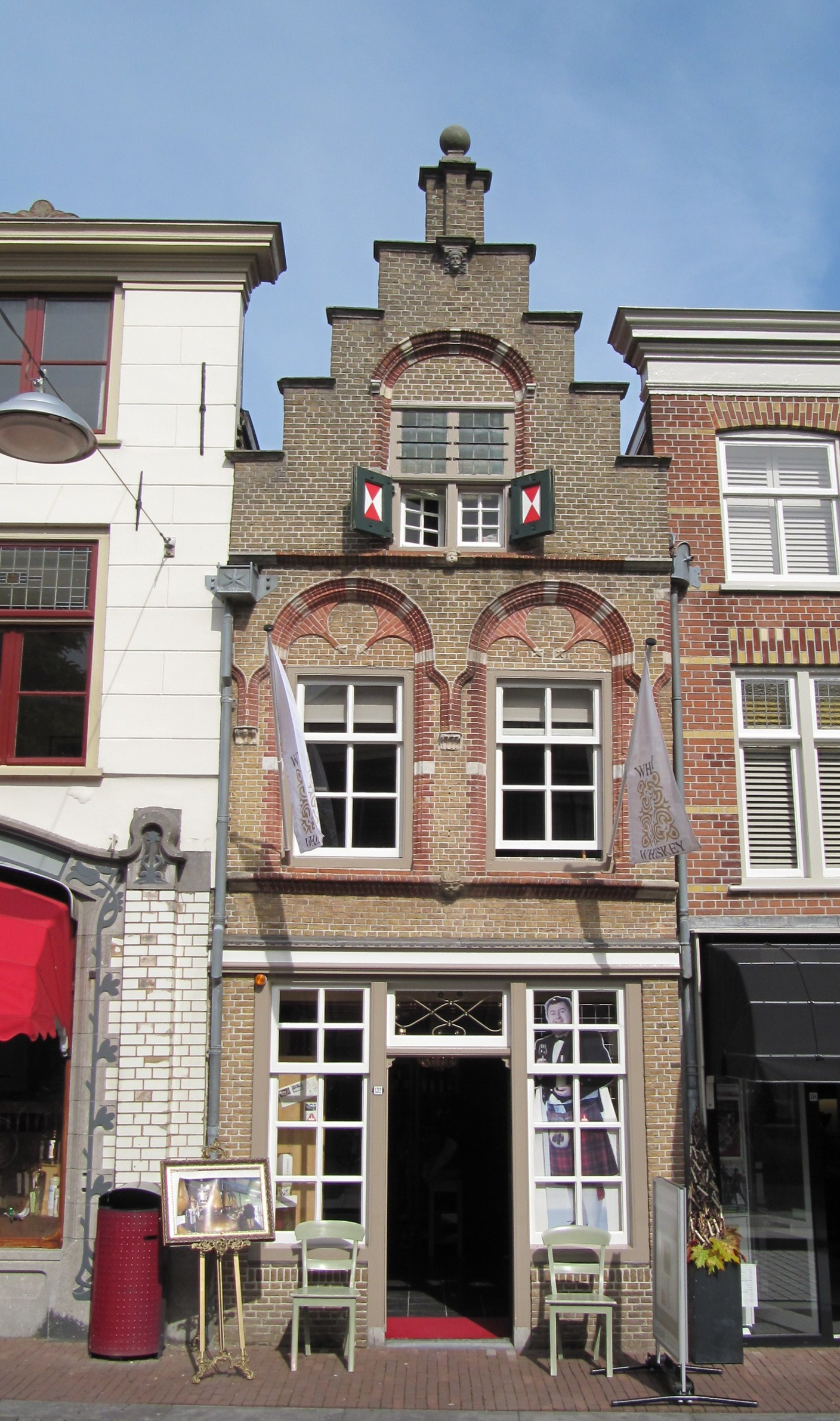 RM13953 Dordrecht - Vriesestraat 132.jpg